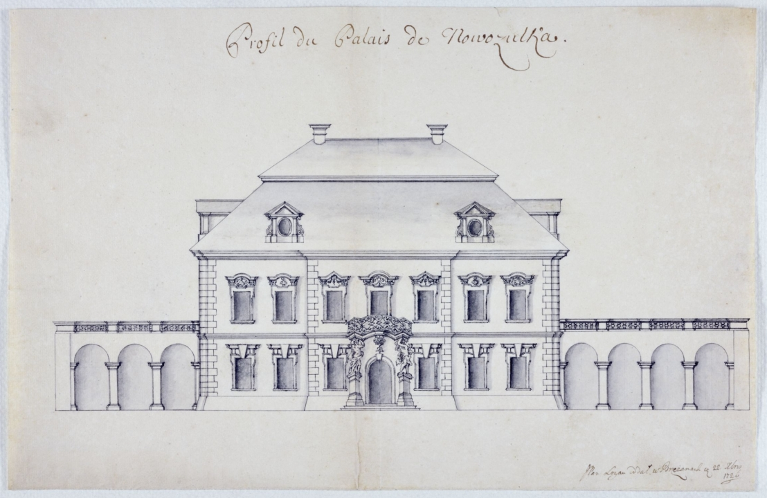 Проект будівництва палацу Потоцьких в Новосілках Золочівського району. Виконаний 1726 року Якобом де Логау. 244 x 378 мм.